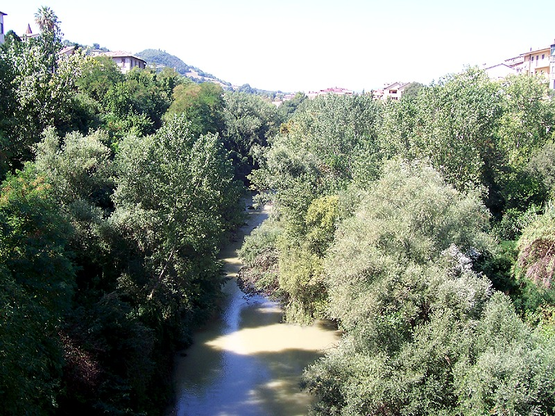 Ascoli Piceno - Fiume Tronto